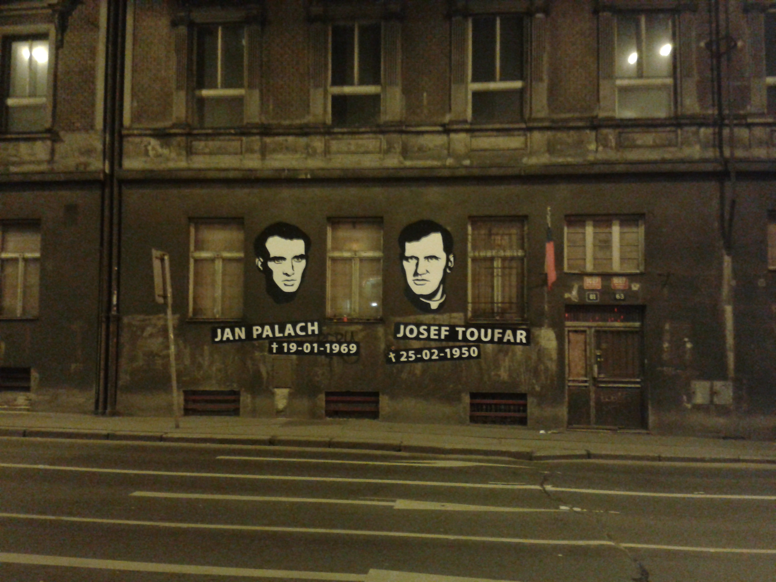 Památník Josefa Toufara a Jana Palacha na budově bývalé nemocnice v Legerově ulici. Autorem instalace je designér Otakar Dušek [1].